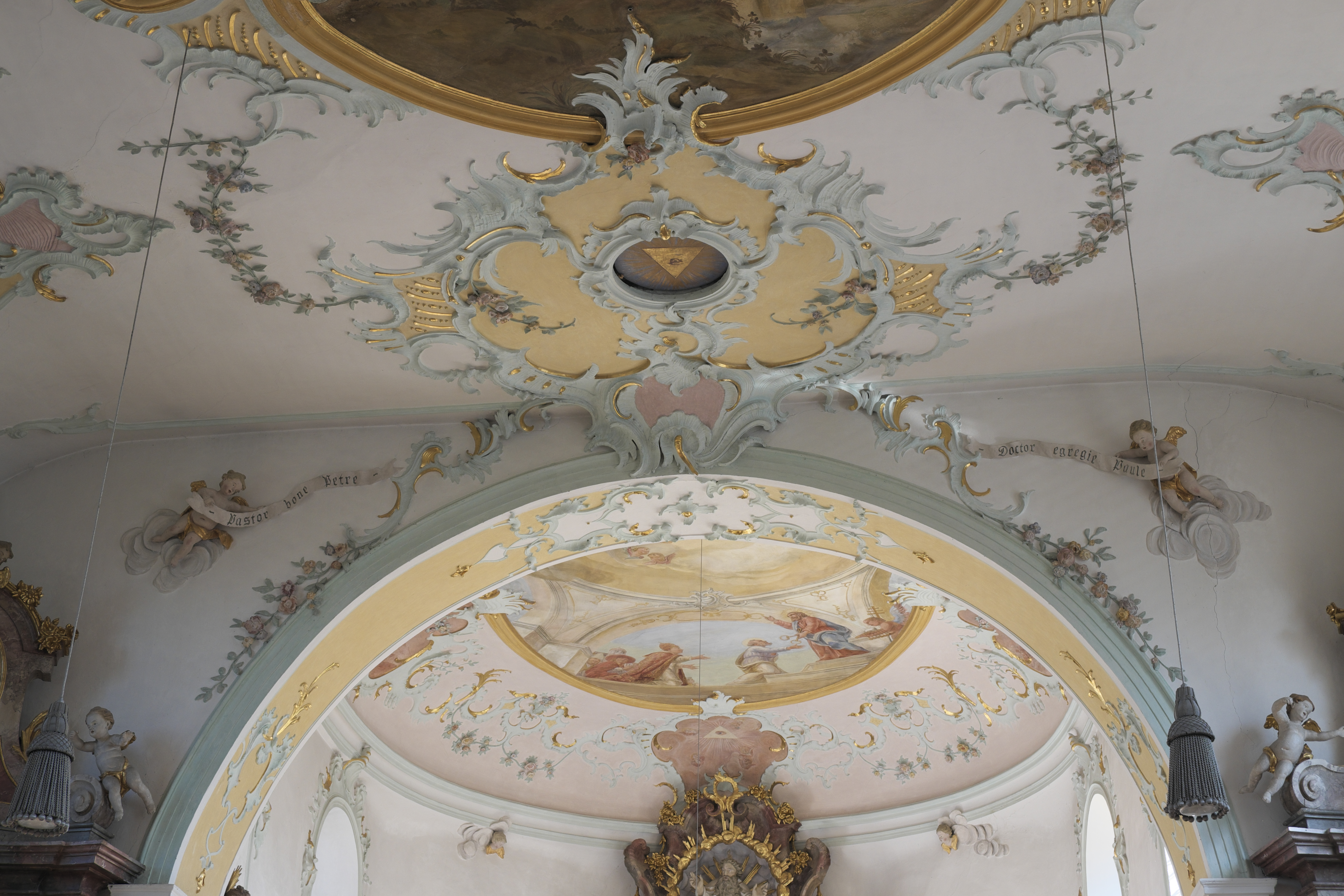 Katholische Pfarrkirche St. Petrus und Paulus in Petzenhausen, einem Ortsteil von Weil (Oberbayern) im Landkreis Landsberg am Lech (Bayern/Deutschland), Chorbogen, Stuckdekor von Franz Xaver Schmuzer, um 1750